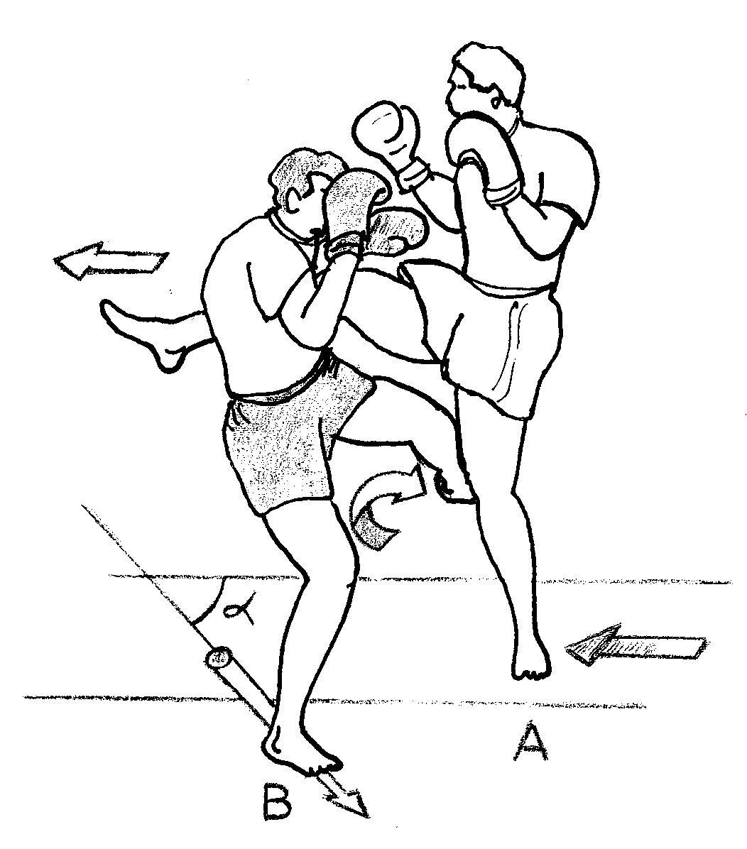 circulaire3.jpg